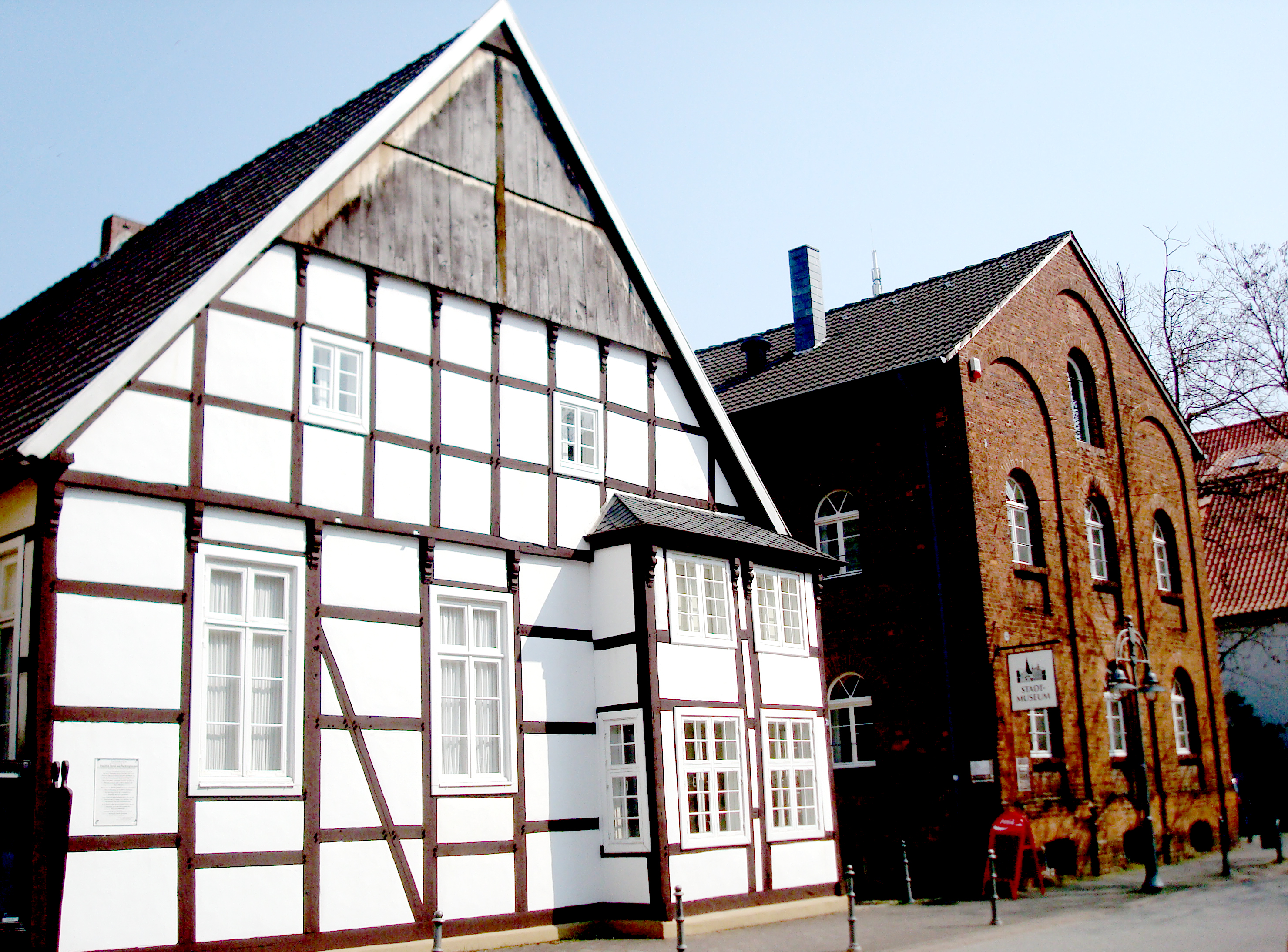 Stadtmuseum Gütersloh This is a photograph of an architectural monument. und A082